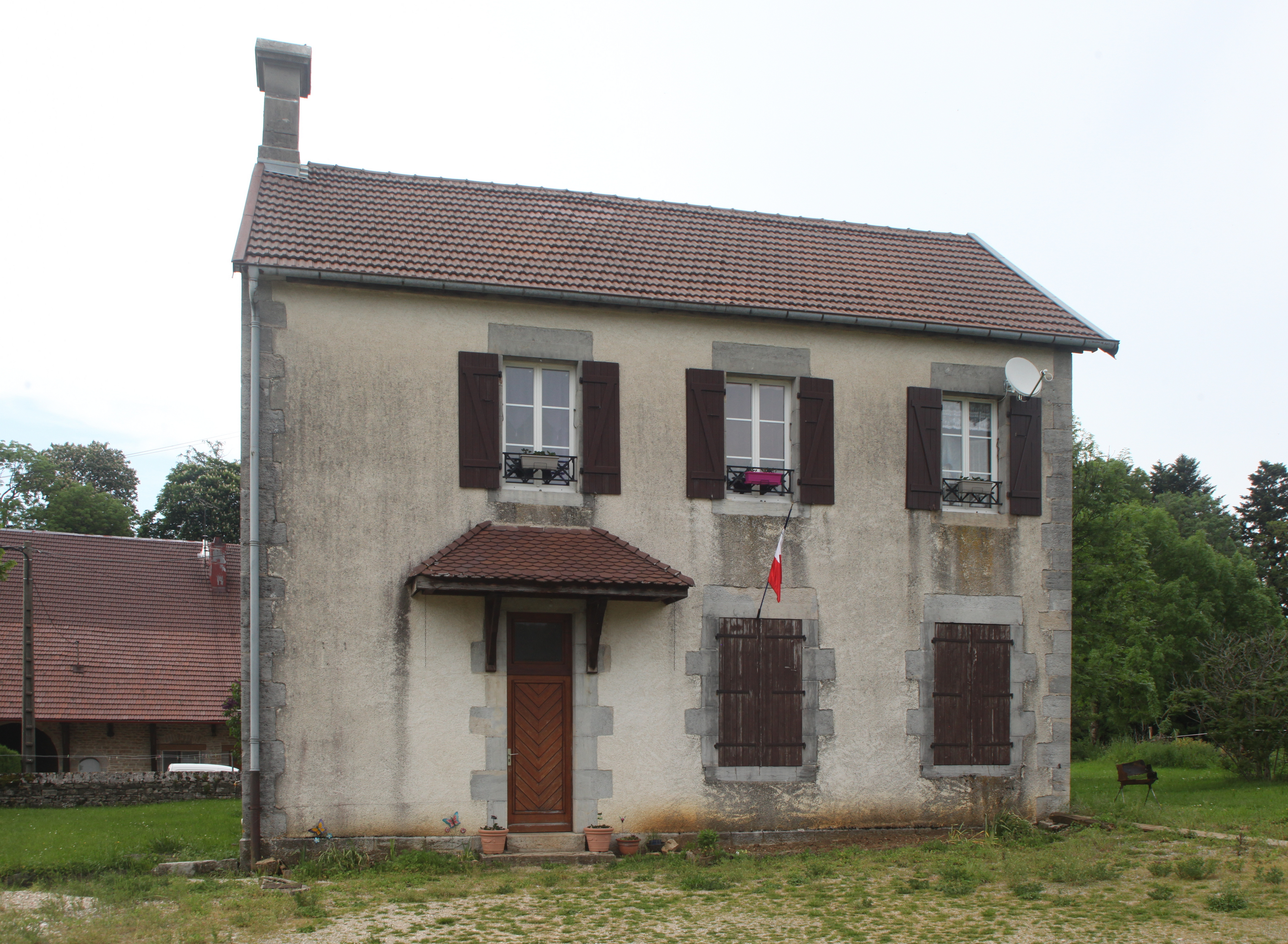 Mairie de Chaux-Champagny (Jura).